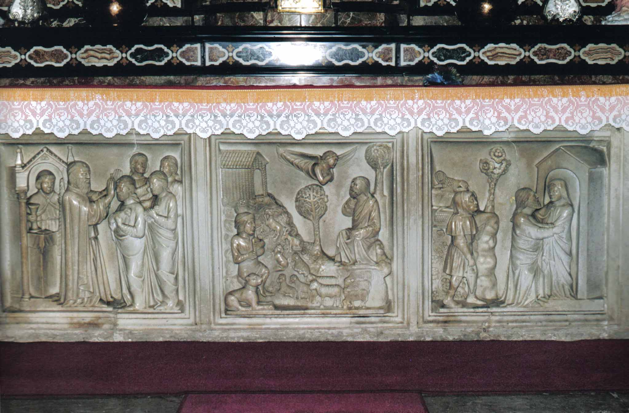 Altare Maggiore della chiesa di Carpiano